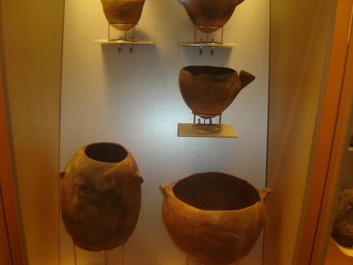 Museo 2